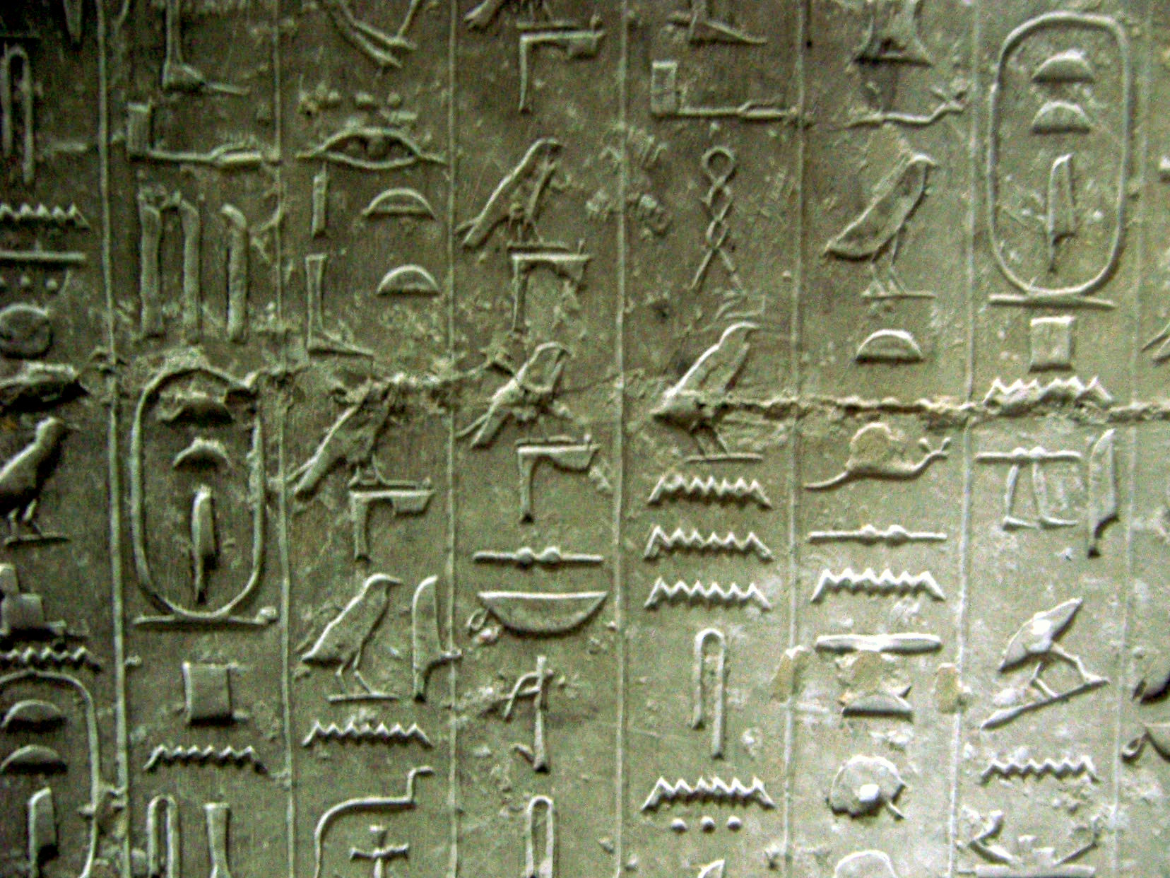 Pictures from Saqqara, Egypt